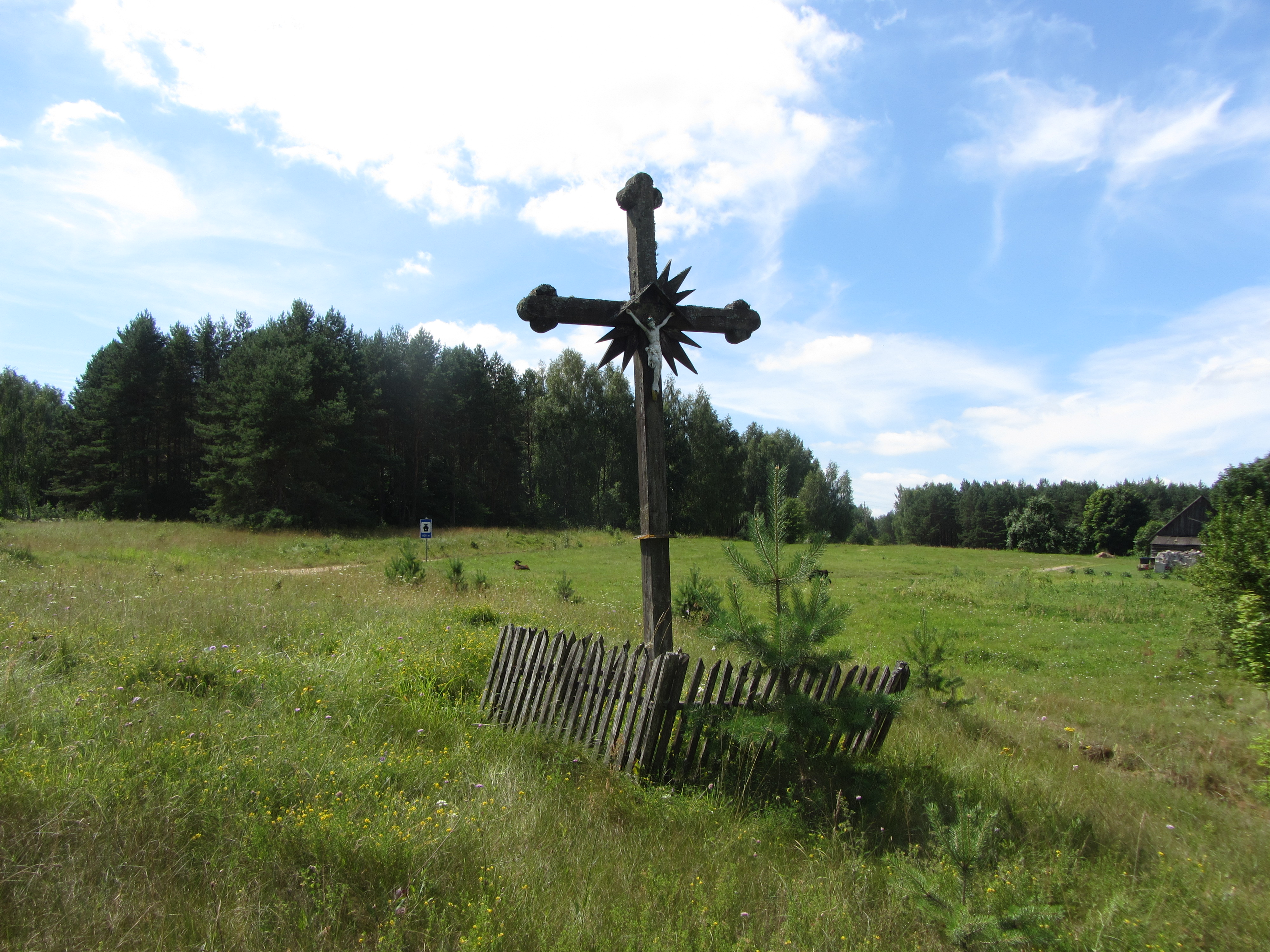 Kirneilė 33165, Lithuania